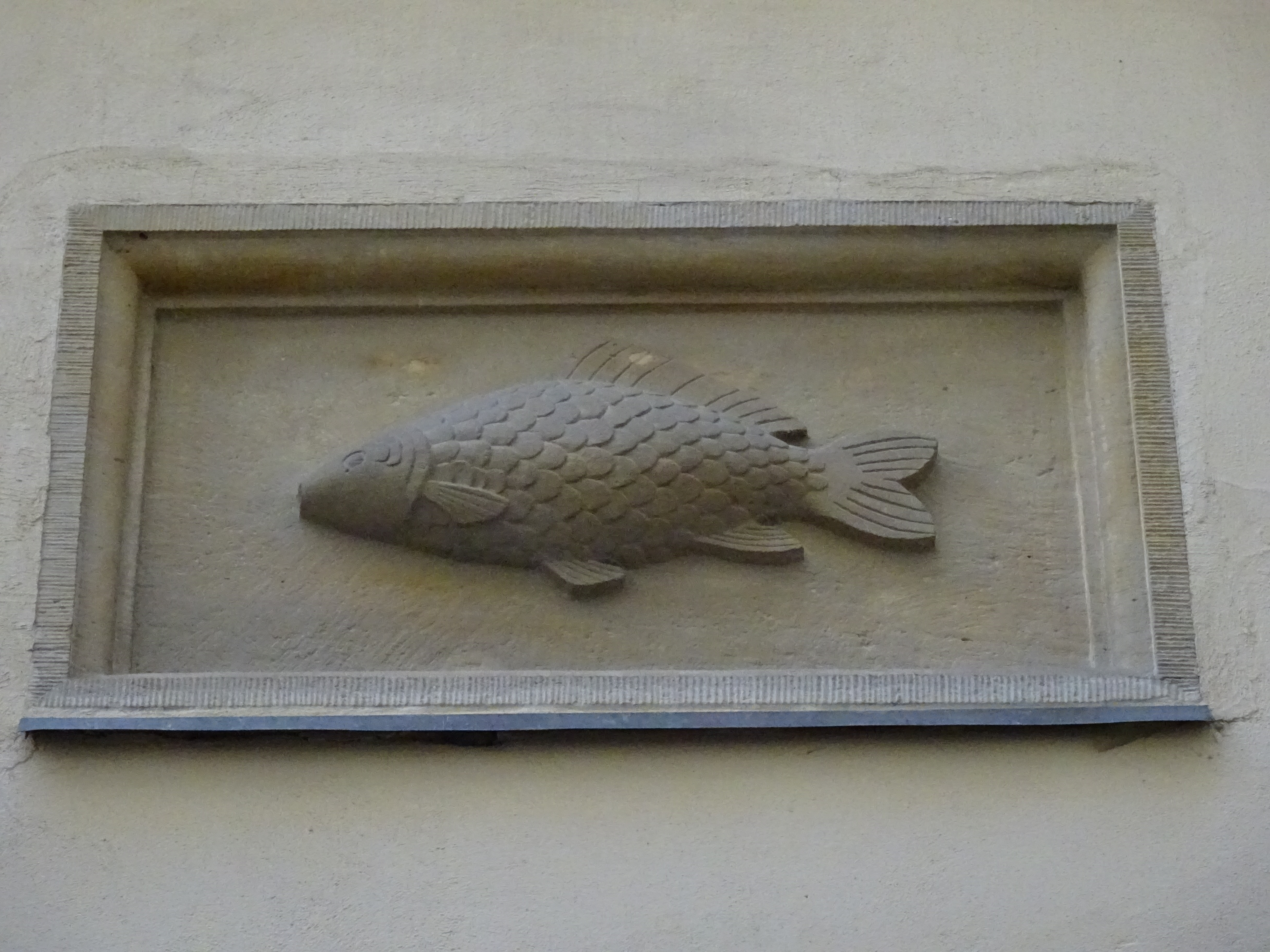 Godło Kamienicy Pod Szarym Karpiem na Rynku Głównym, ot - szary karp na południowej ścianie na podwórku kamienicy. Kraków, 2016.